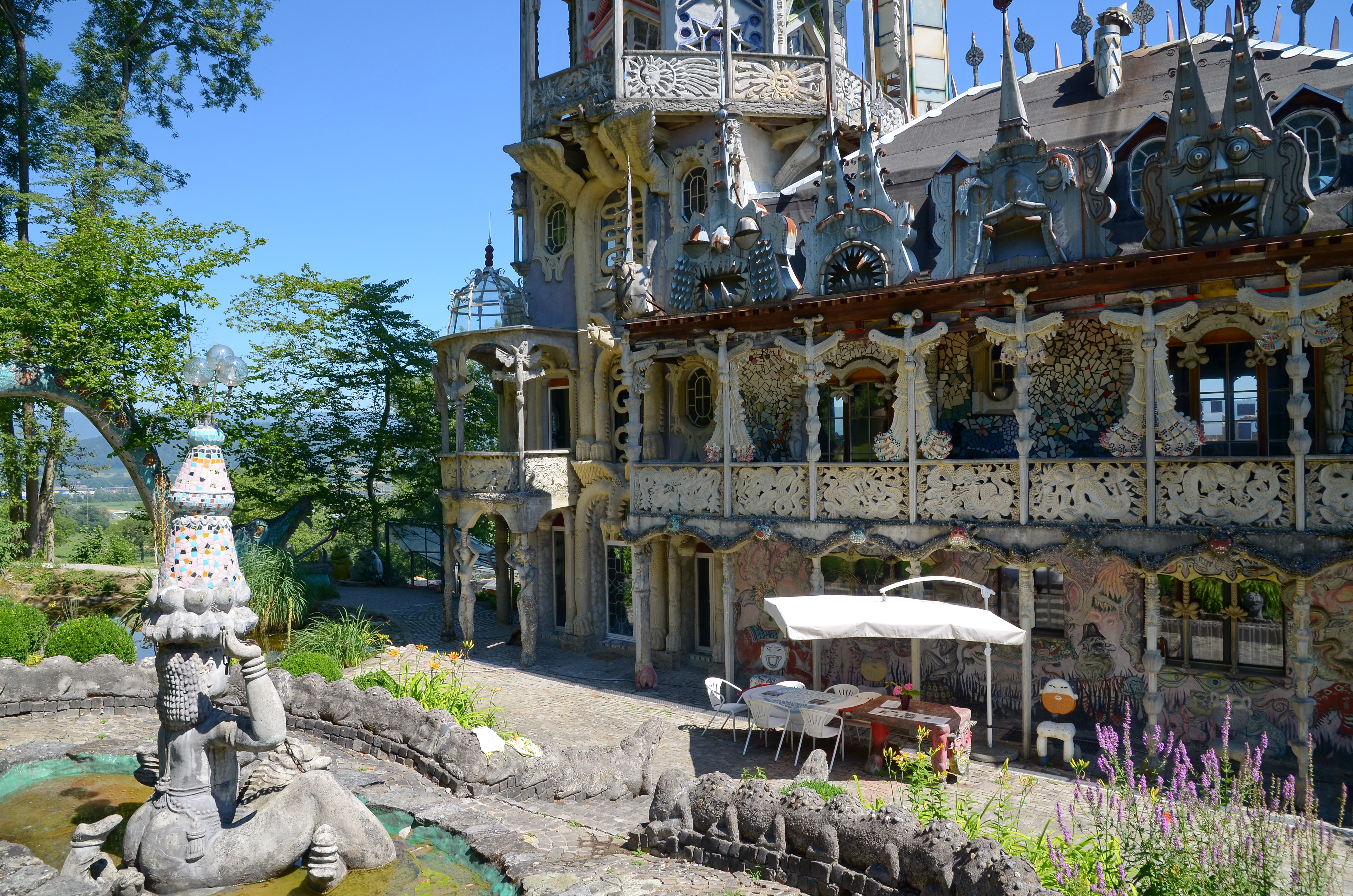 Bruno Weber Skulpturenpark in Dietikon - Spreitenbach (Switzerland)